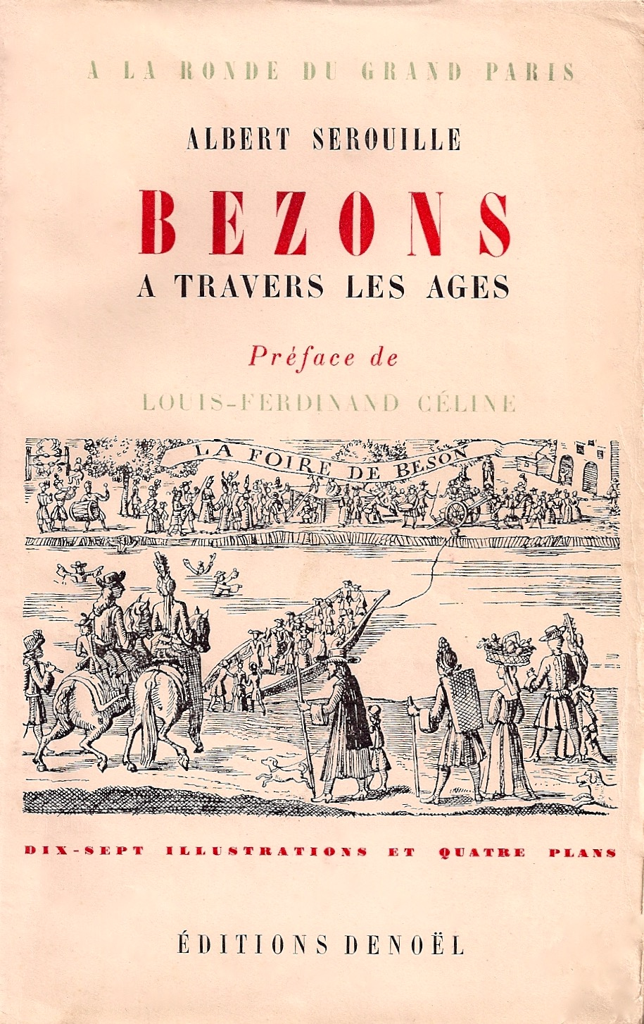 Albert Serouille, Bezons à travers les âges, préface de Louis-Ferdinand Céline, 1944.